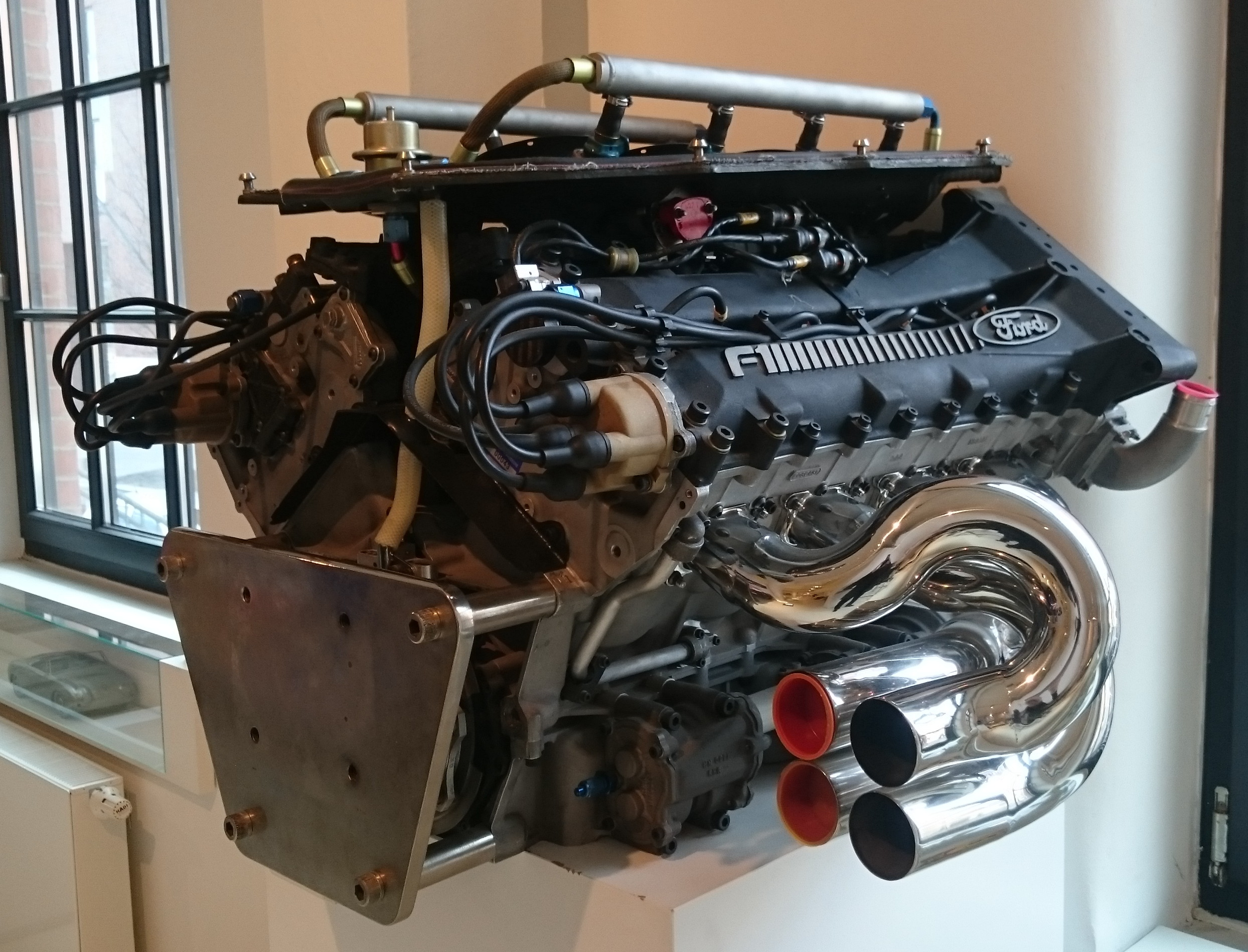 Ford Cosworth HB4 3.5 V8 von 1991, aus dem F1-Fahrzeug Jordan 191; ausgestellt im Prototyp Museum in Hamburg